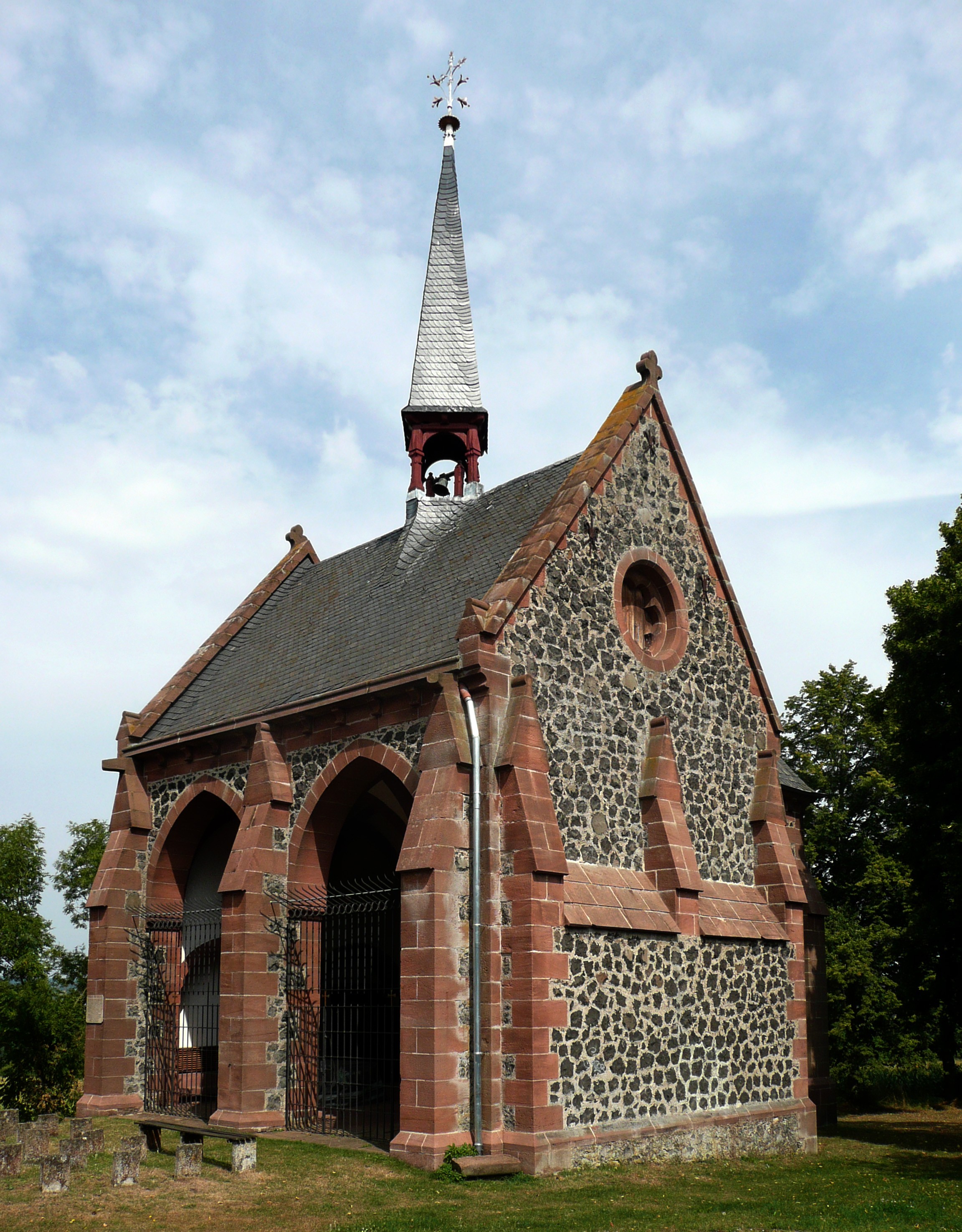 Lindaukapelle (Magdalenen-Kapelle) in Amöneburg, Mittelhessen. Ansicht von SW. This is a photograph of an architectural monument.